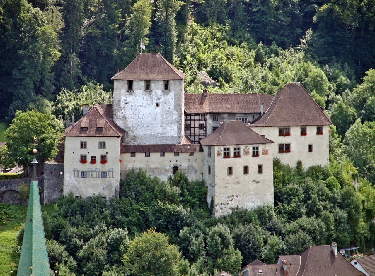 Feldkirch (Vorarlberg): Blick vom Ardetzenberg zur Schattenburg.